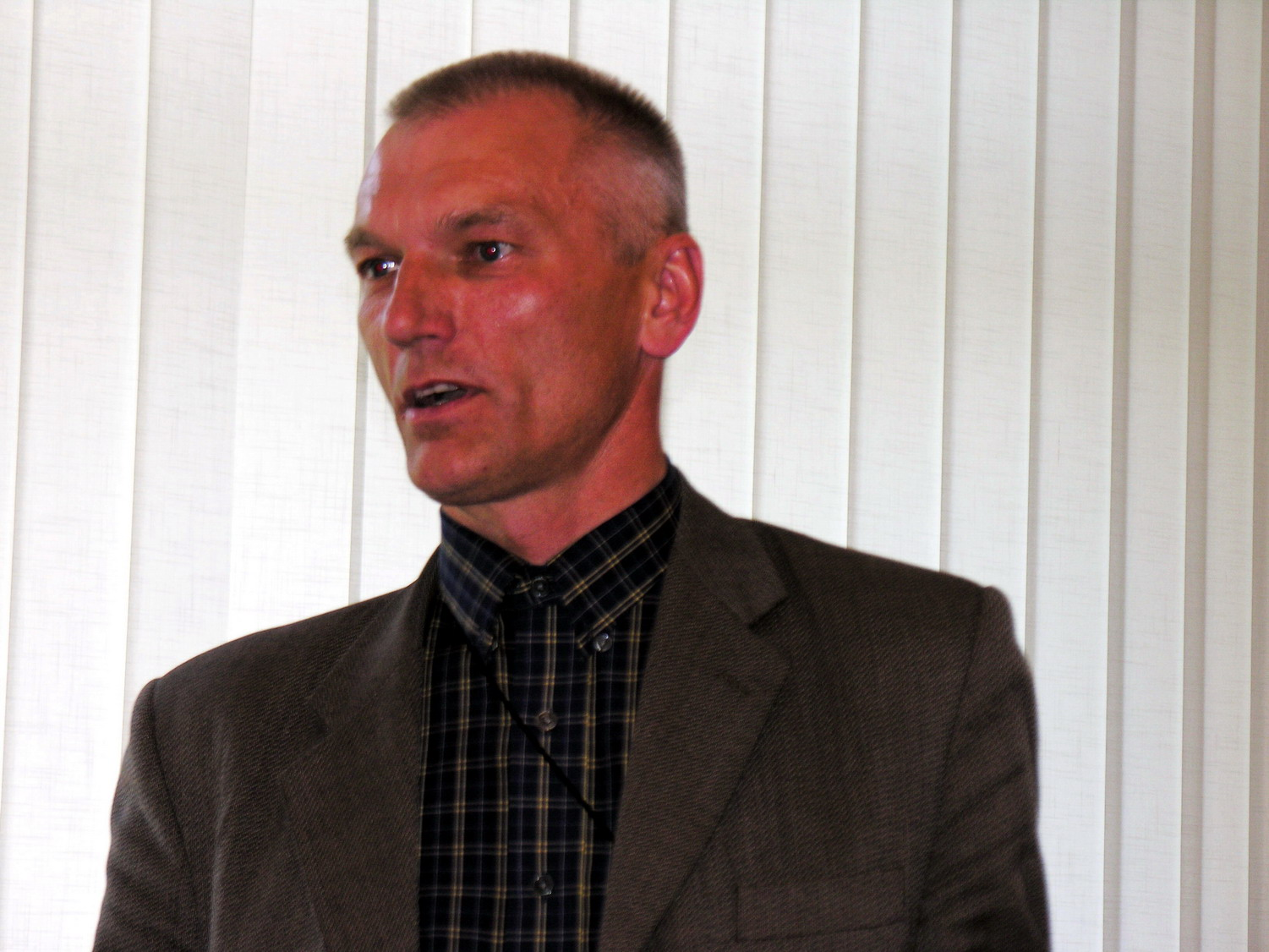 Gintautas Alekna